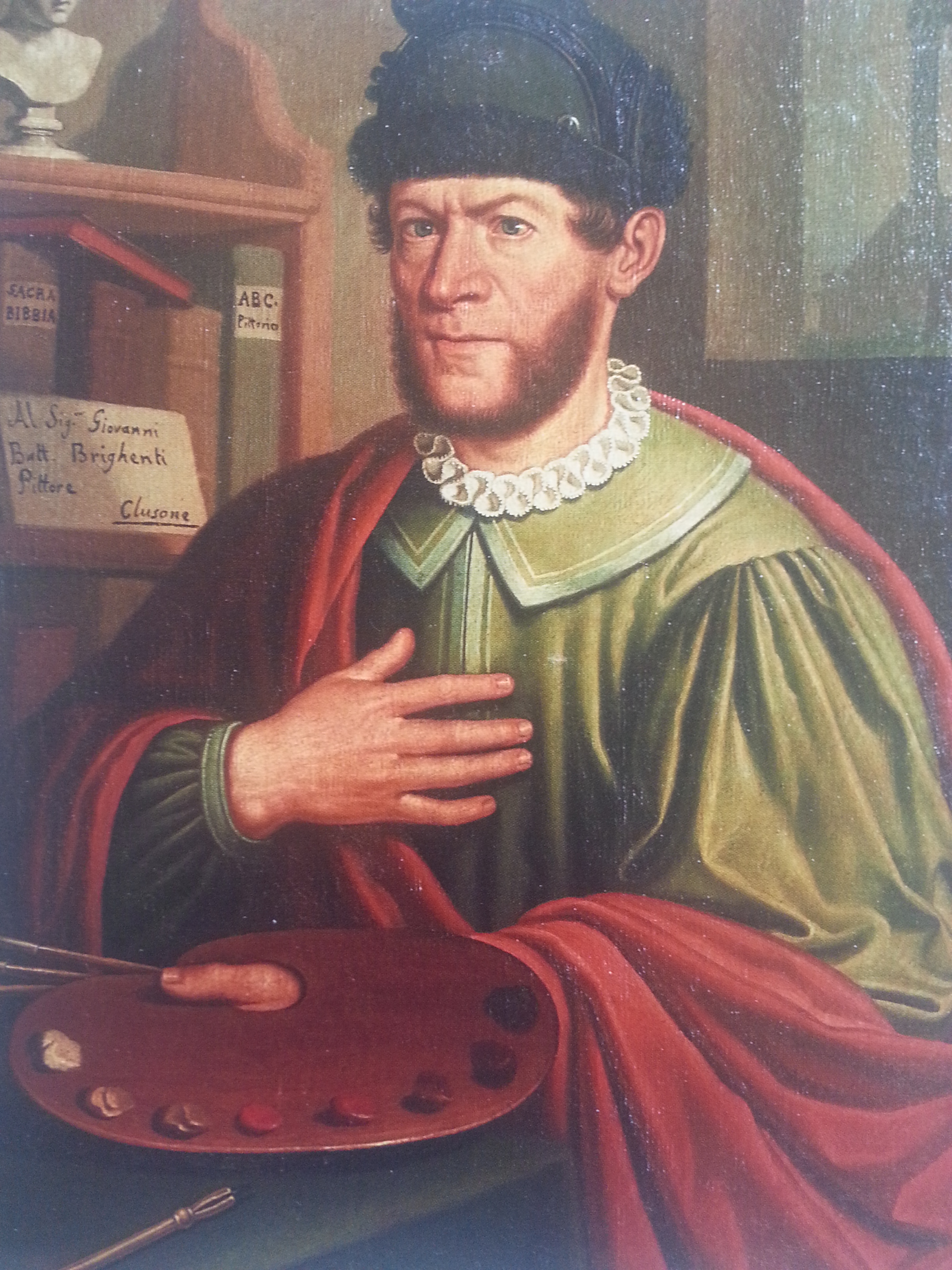 Giovanni Brighenti - Autoritratto